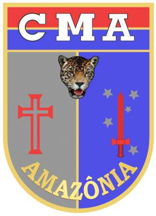 Brasão do Comando Militar da Amazônia